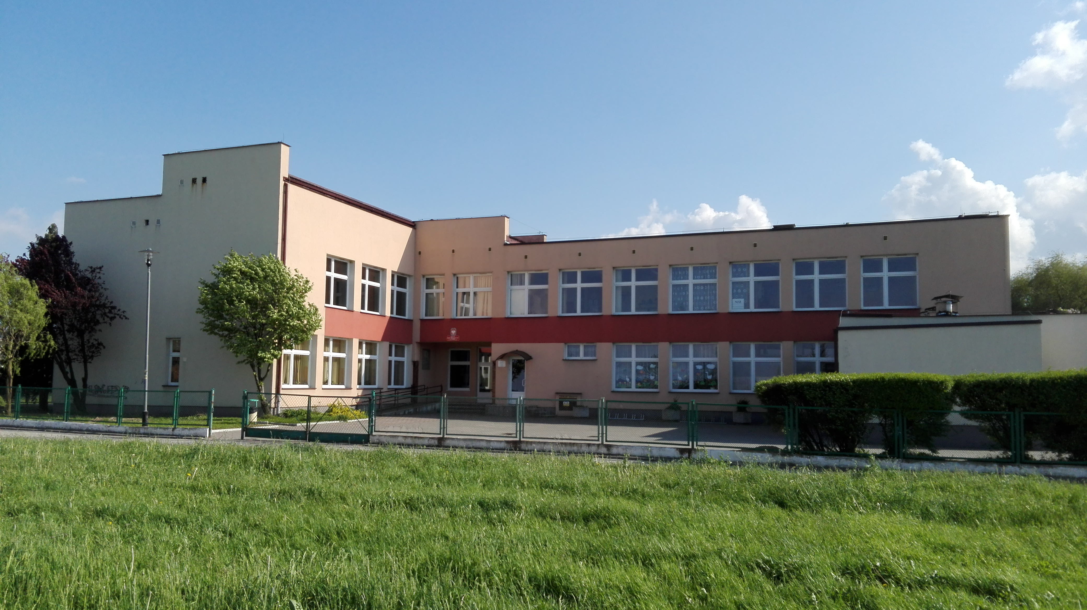 Prudnik, osiedle Jesionowe Wzgórze